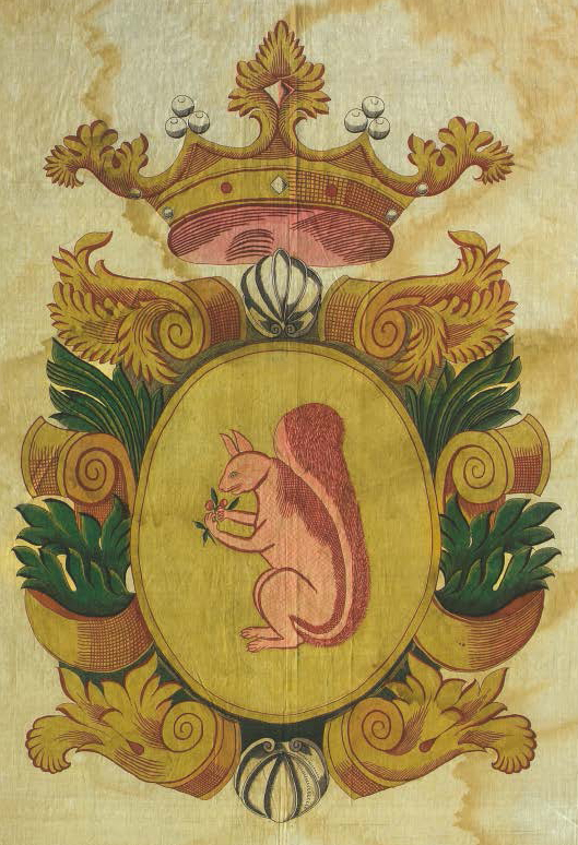 Wapen van Jan Albert Sichterman